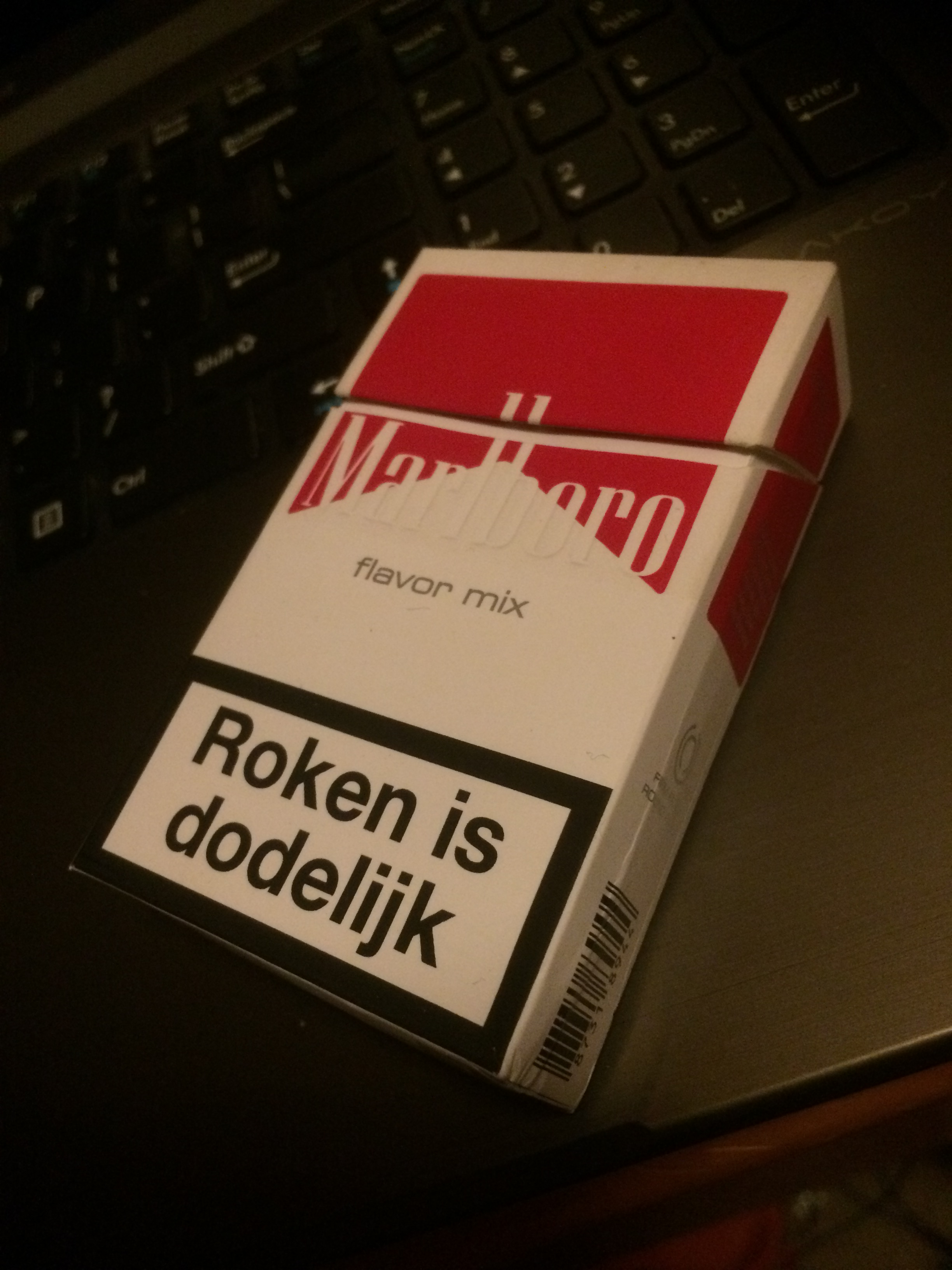 Pack of Marlboro flavor mix cigarettes with dutch warning text